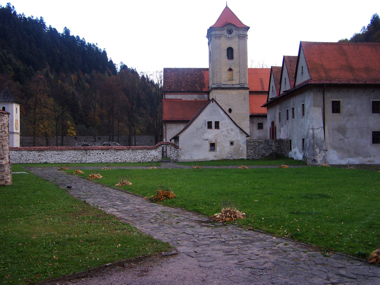 Czerwony Klasztor (Słowacja, Červený Kláštor)